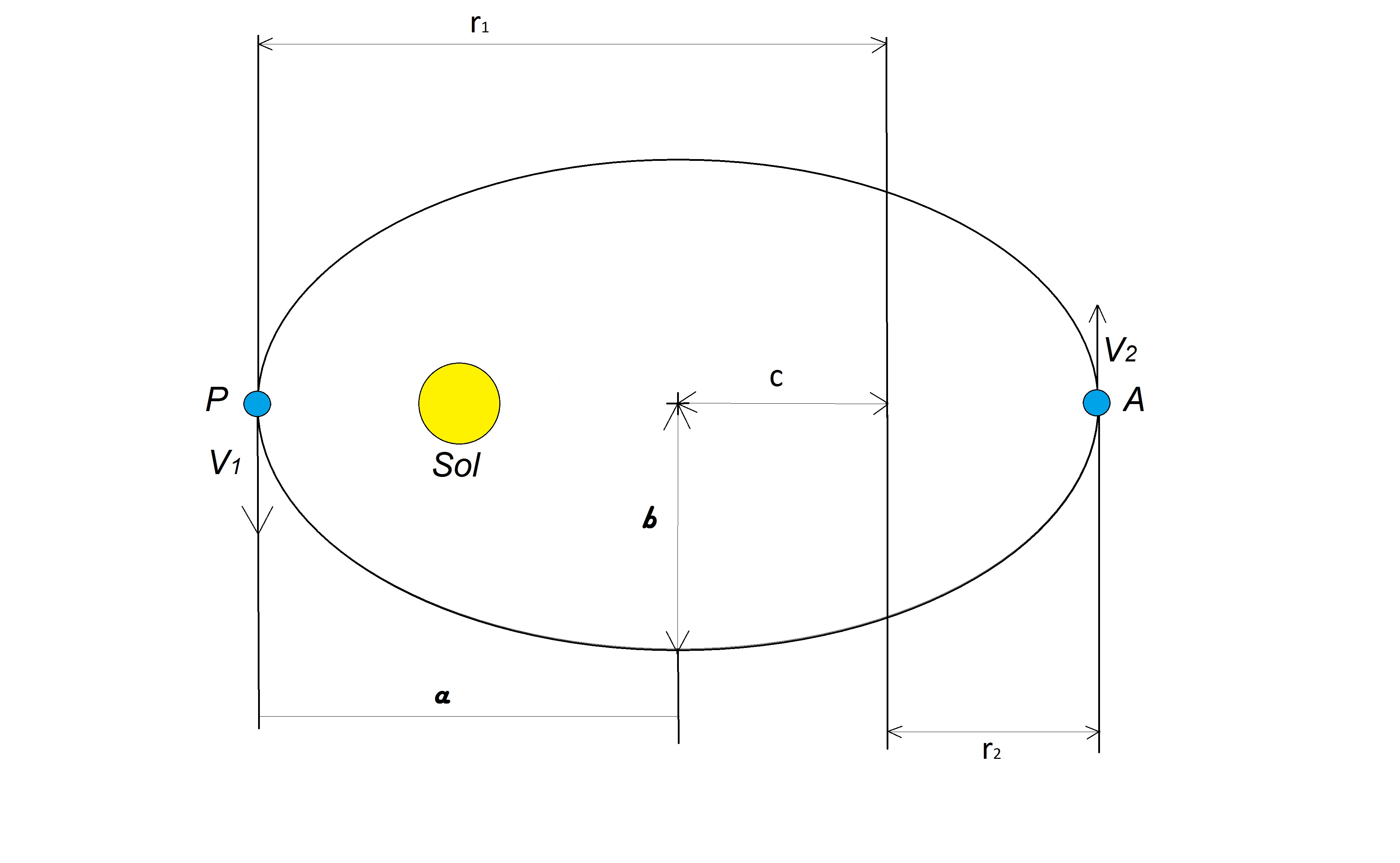 Расположение планет относительно солнца в перигелии (P) и афелии (A)